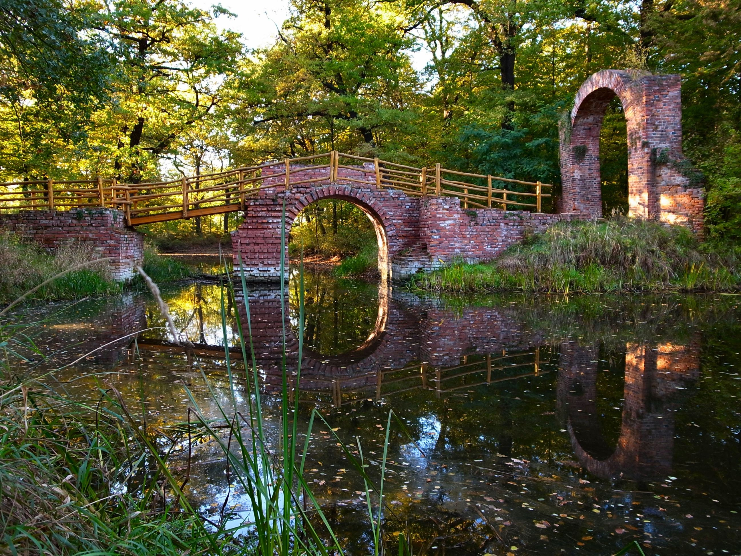 Dessau, Ruinenbrücke im Georgium (Beckerbruch)